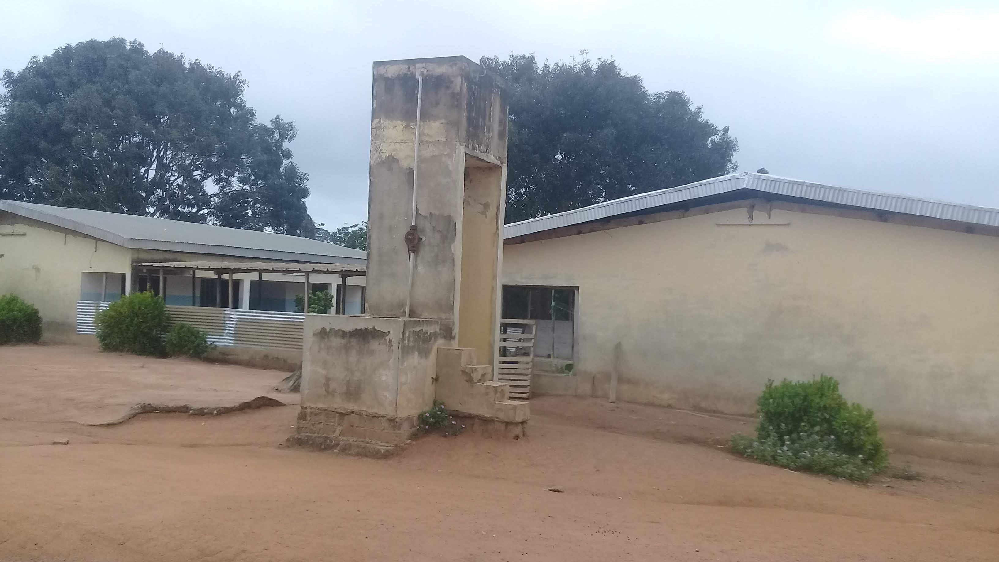 Torossanguéhi est une localité du nord-est de la Côte d'Ivoire